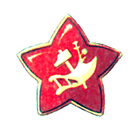 Форменная звезда красной армии.